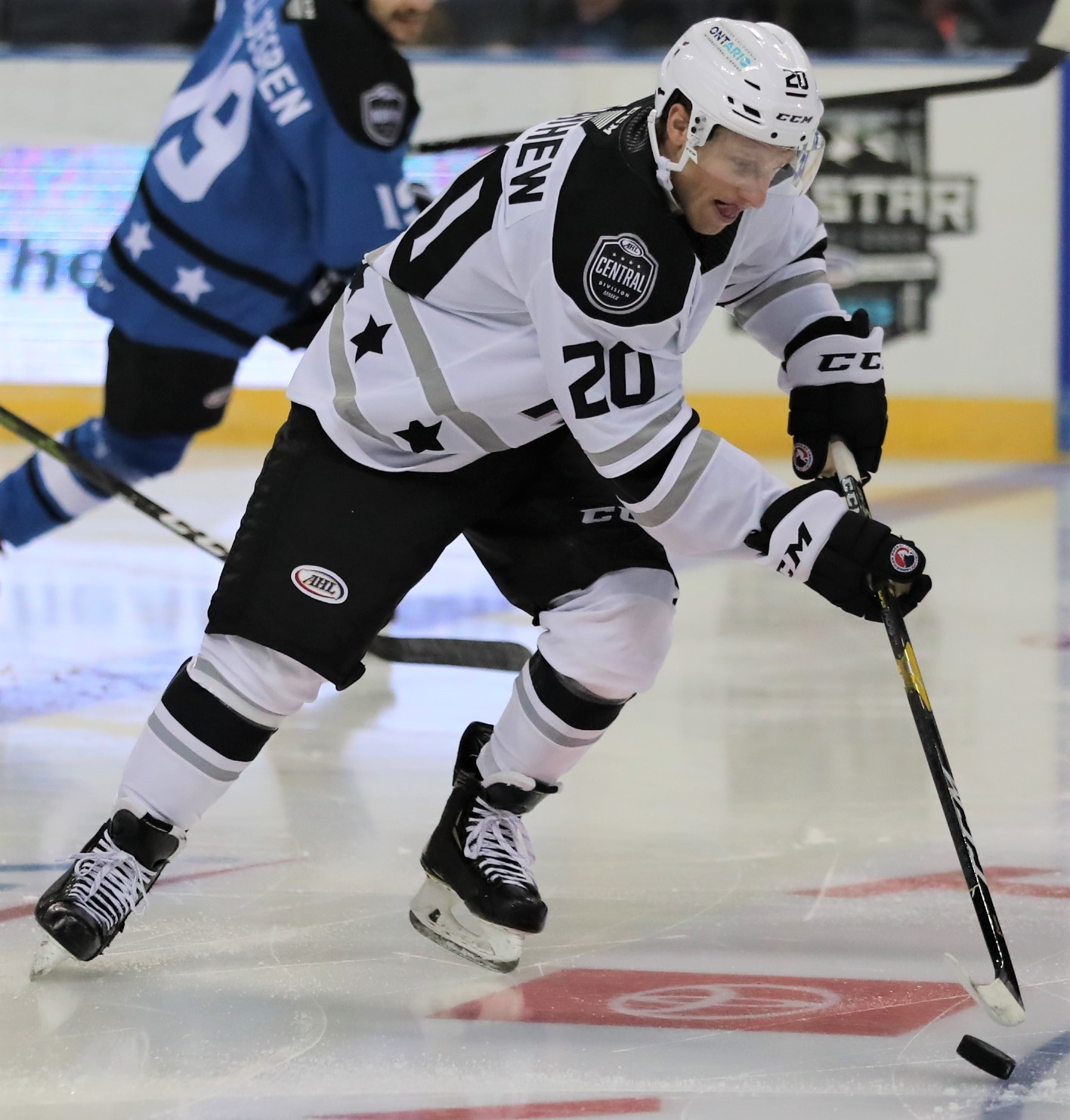 AA3I2979